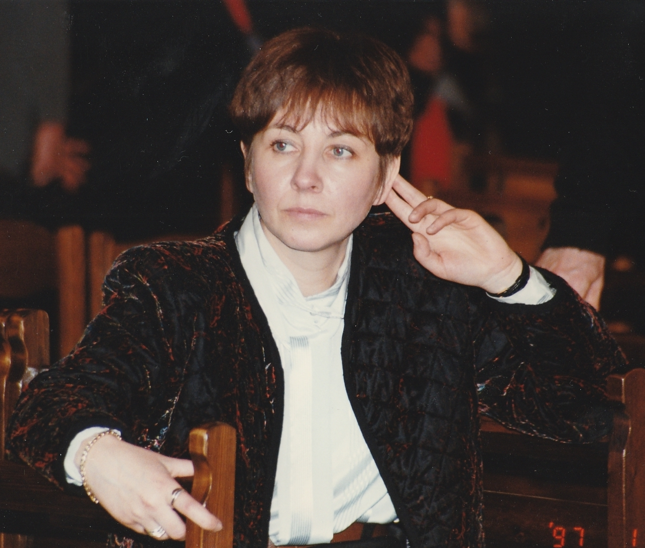 Раевская Ольга Владимировна - Московский государственный университет МГУ имени М.В.Ломоносова